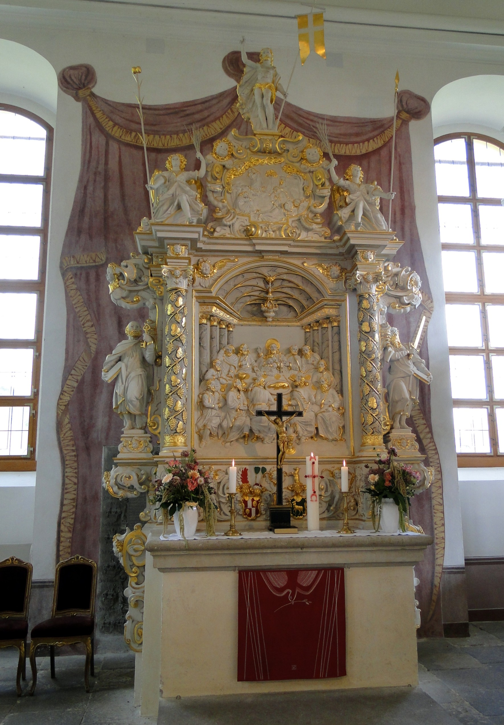 Die Weinbergkirche in Dresden-Pillnitz